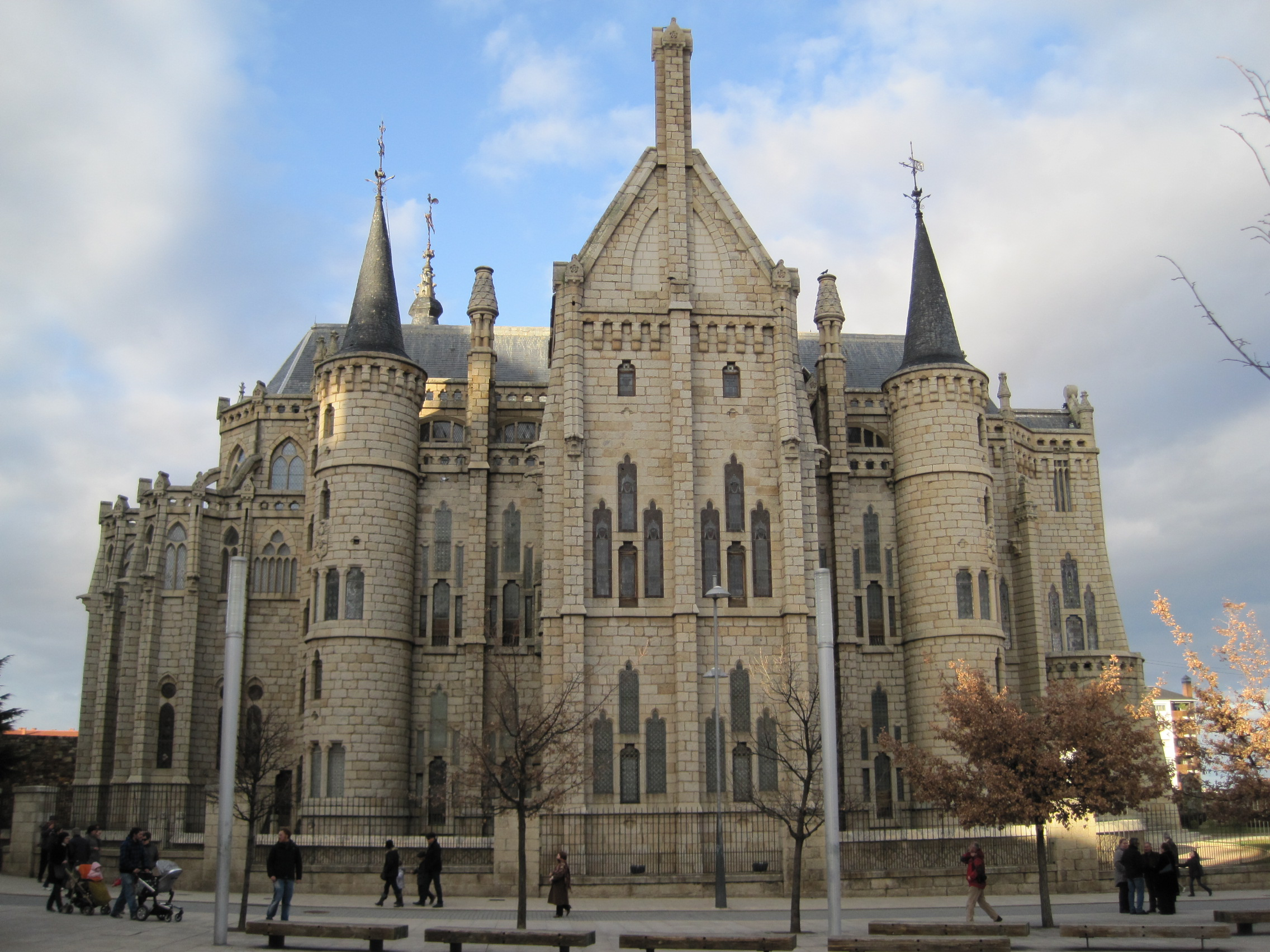 Vista lateral del Palacio Episcopal de Astorga (León, España).